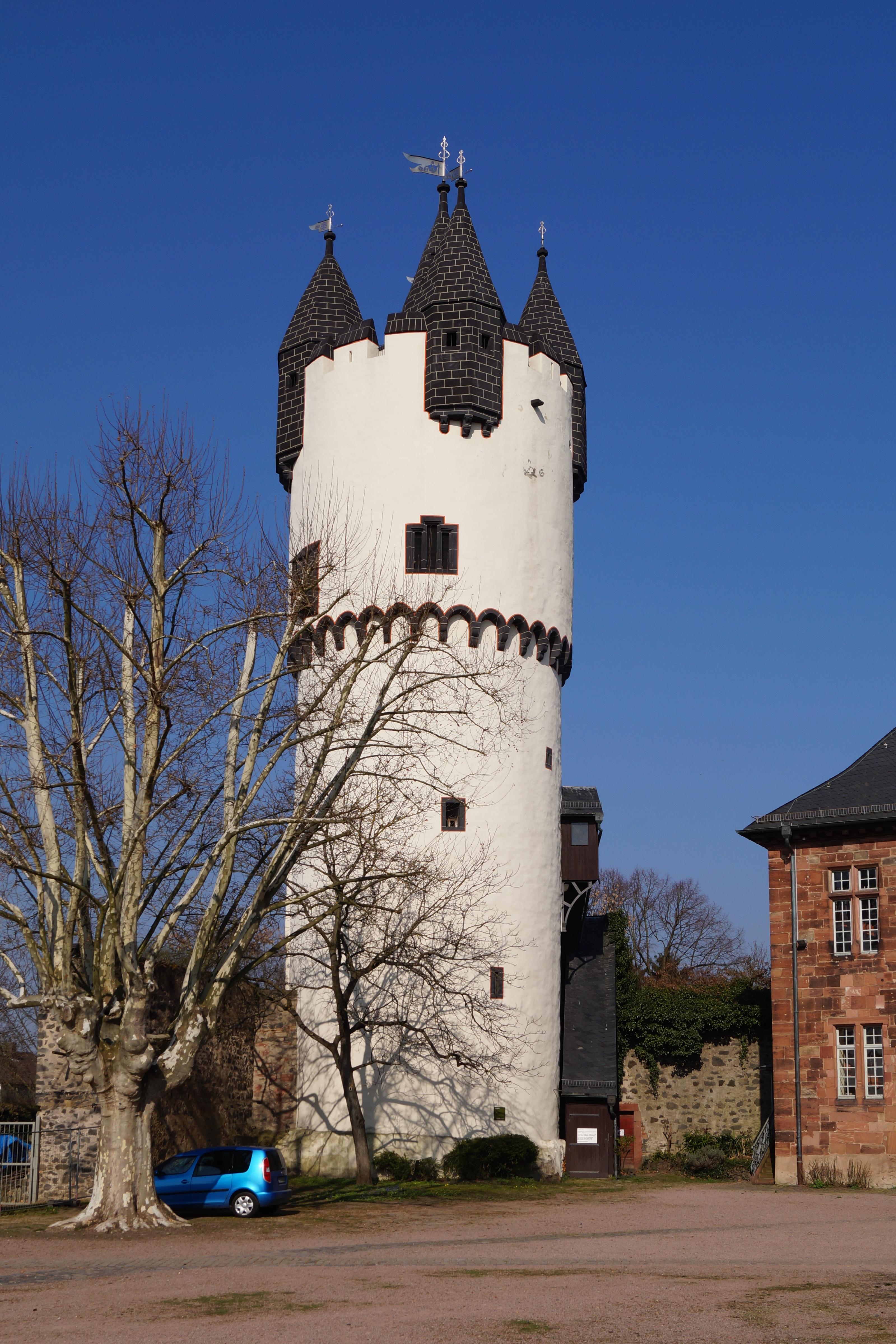 Ansicht des Bergfriedes von Schloss Steinheim vom Schlosshof.